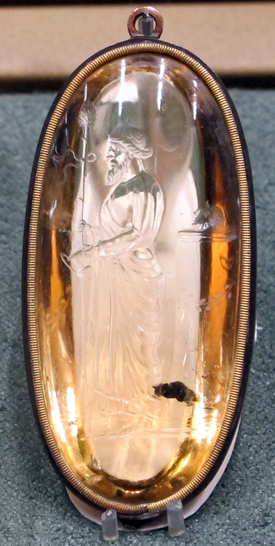 Sala delle Nozze Aldobrandini (Musei della biblioteca Apostolica Vaticana), esposizione temporanea (dicembre 2013) e collezione permanente